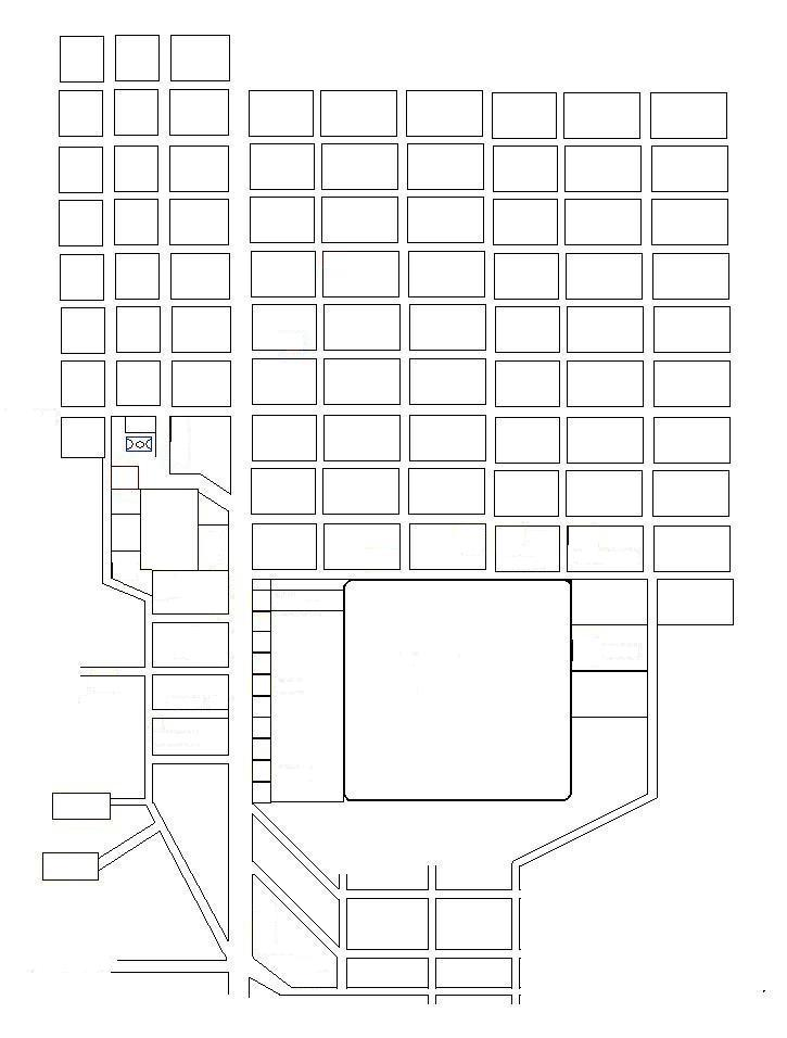 Mapa de Itzapa